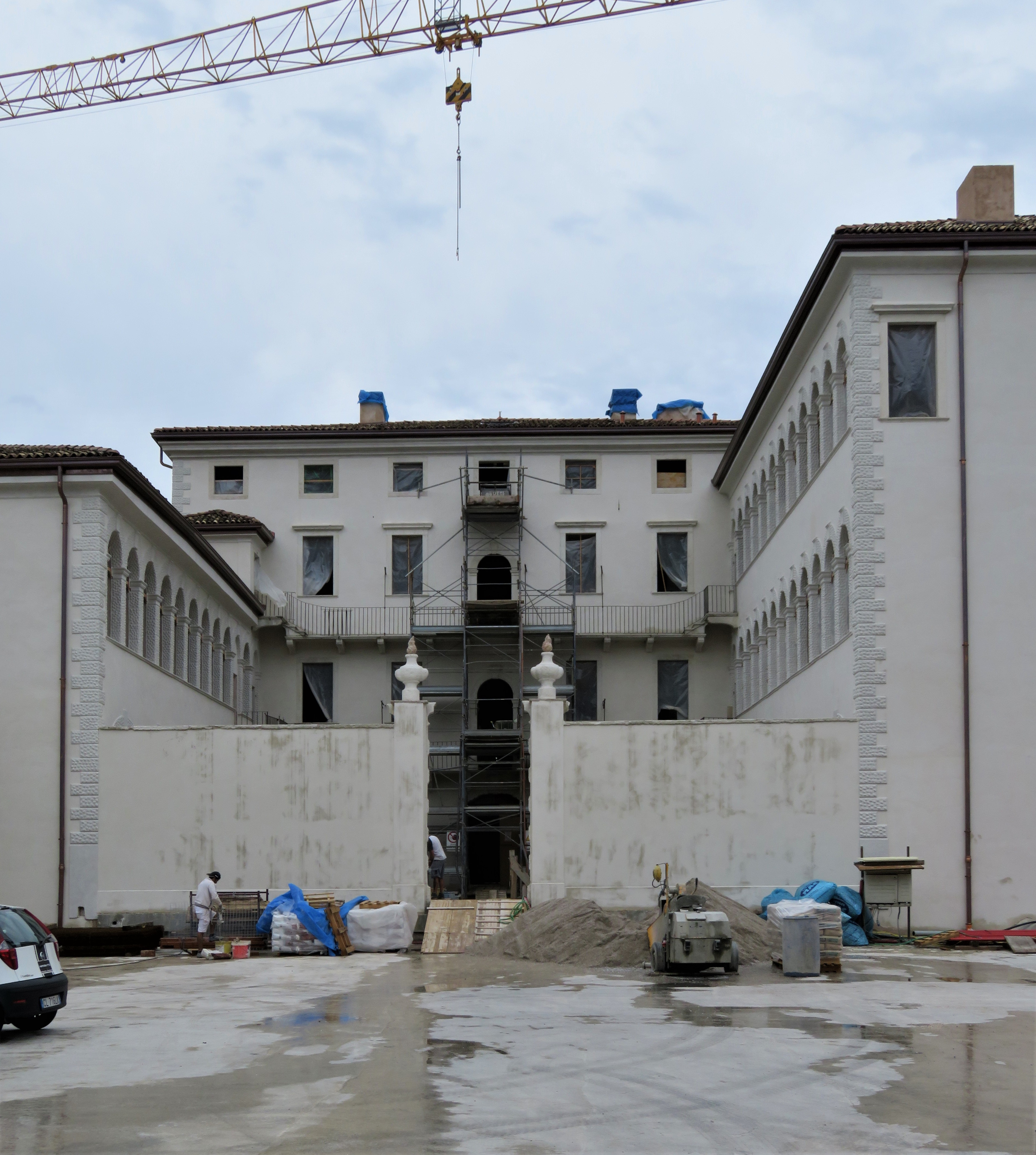 Prospetto posteriore durante i lavori di ristrutturazione